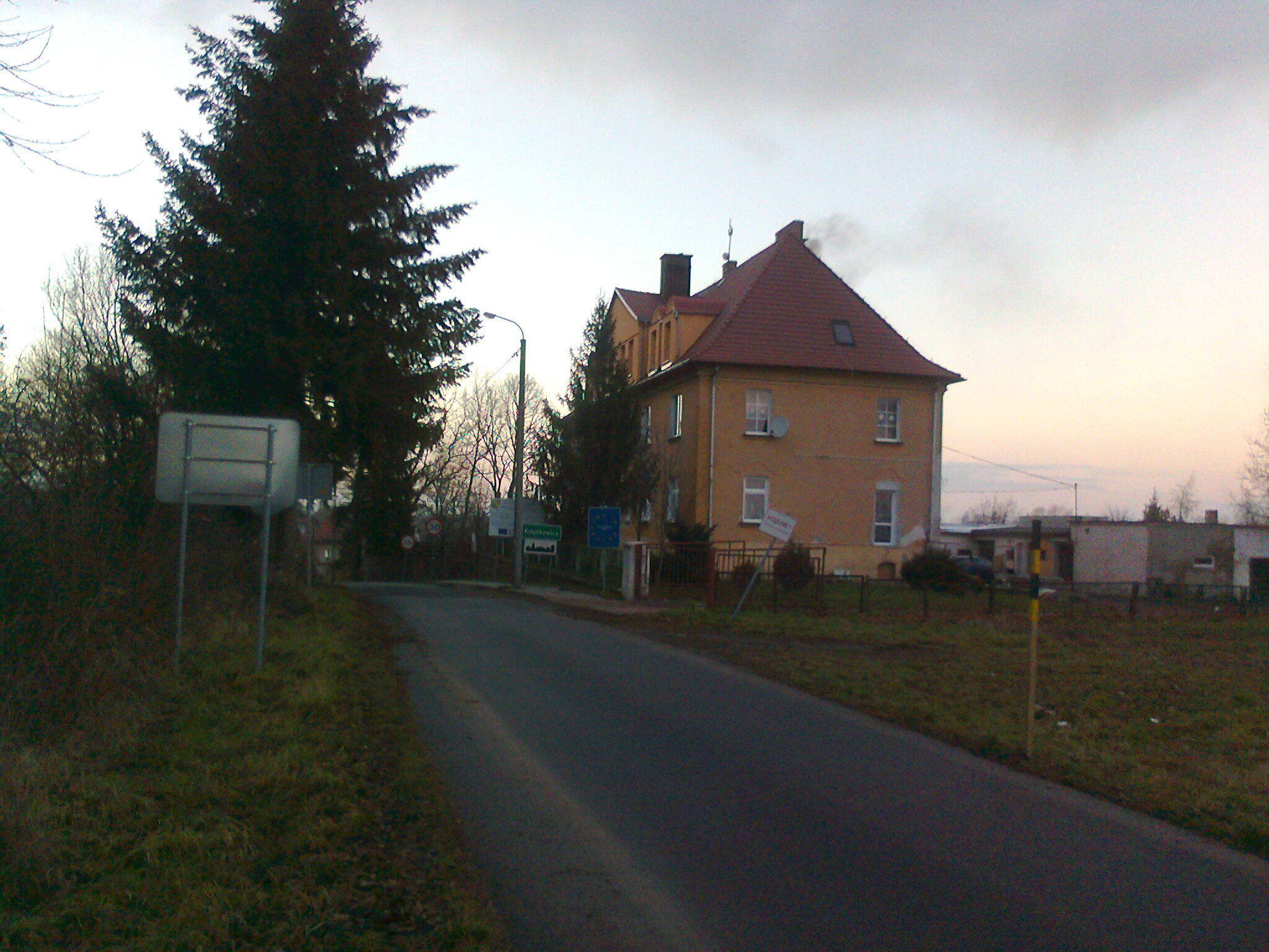 Krzyżkowice, budynek mieszkalny. Budynek byłej strażnicy Wojsk Ochrony Pogranicza Krzyżkowice (WOP)